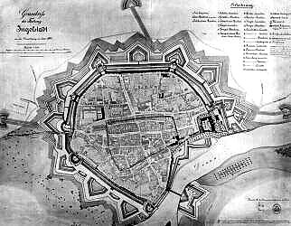 Festung Ingolstadt im 18 Jh.